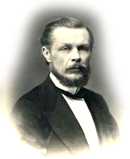 Arthur Joachim von Oettingen (1836–1920), Physiker und Musiktheoretiker